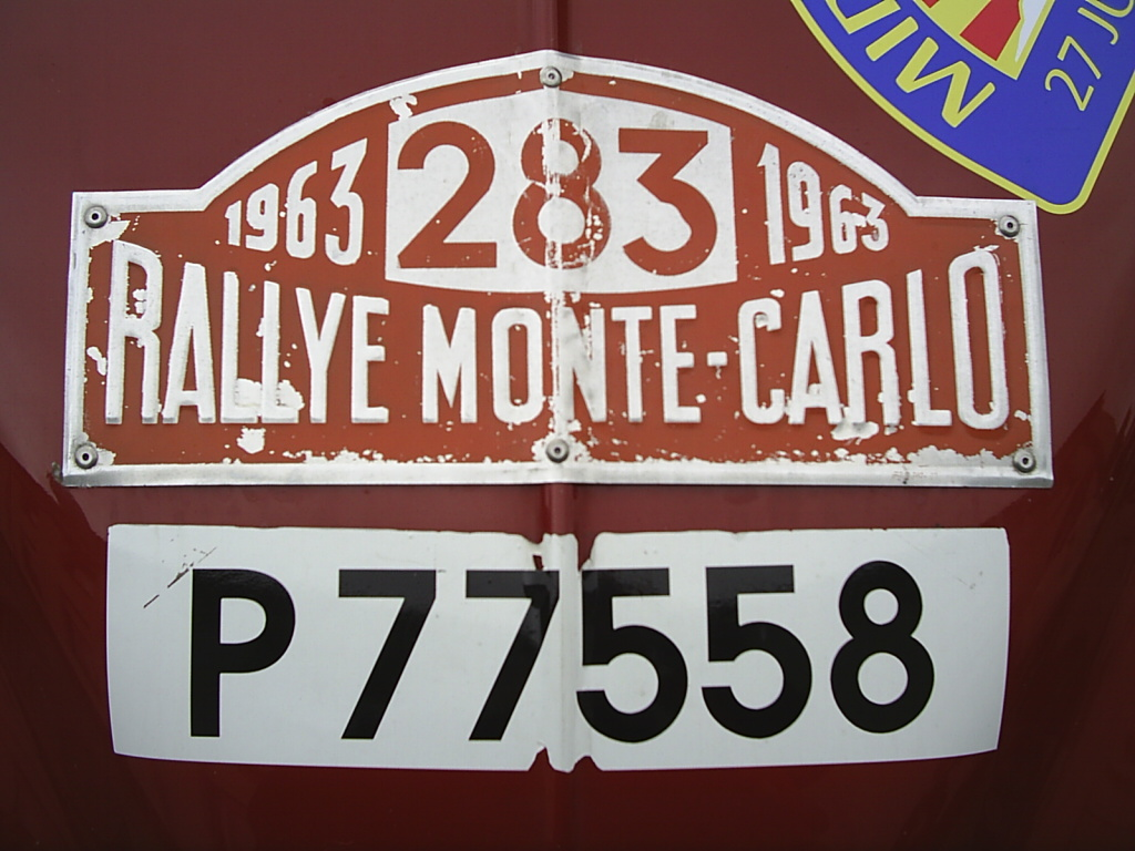 Plaque Rallye n°283 Rallye Monte Carlo.